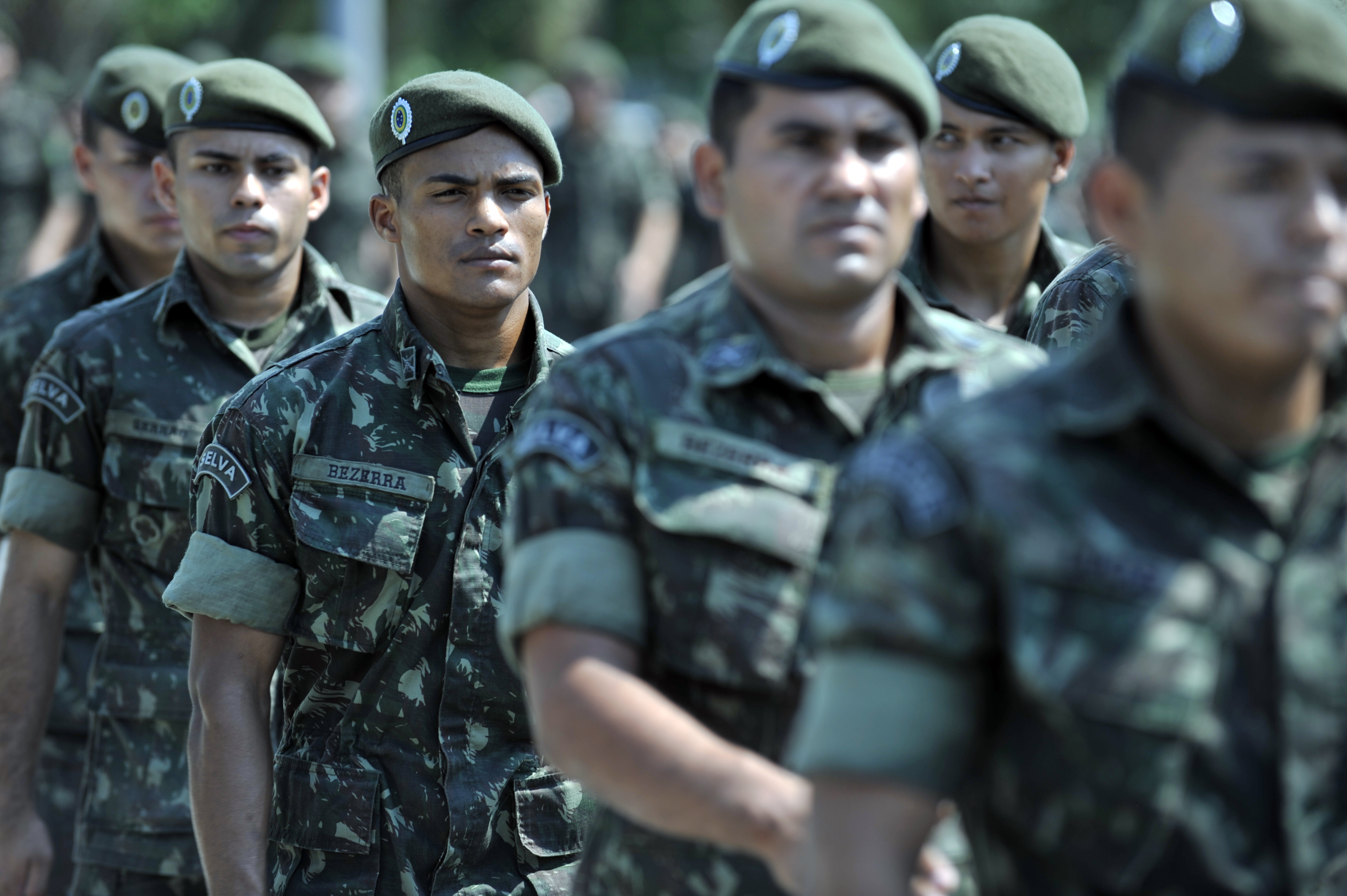 03/12/2014, Manaus - AM Fotos: PH Freitas